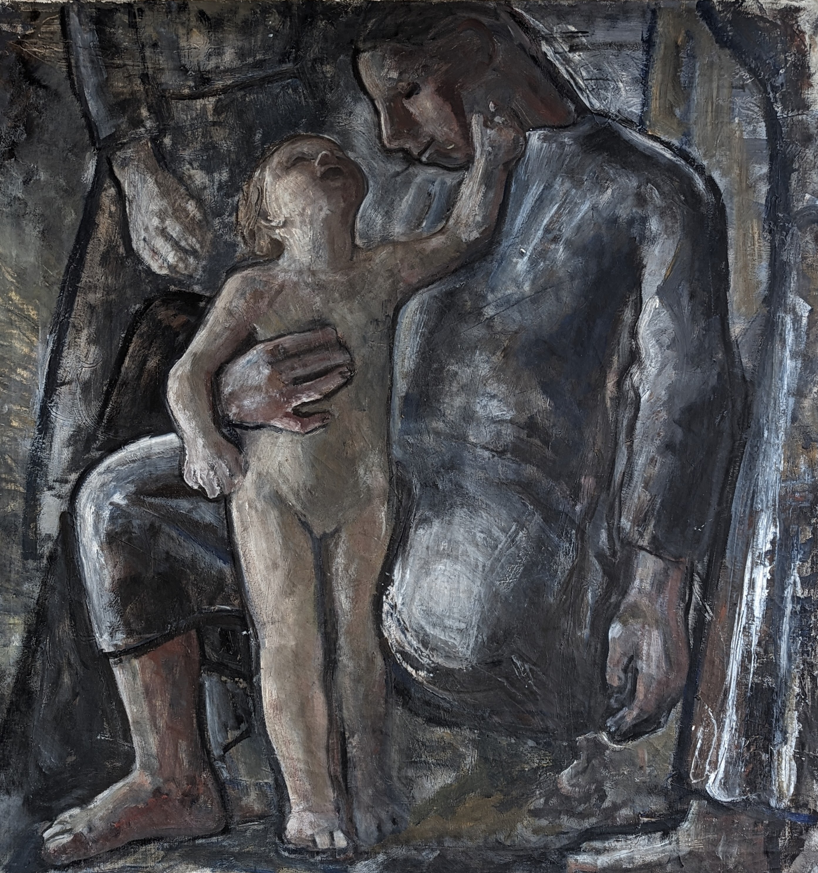 Knælende kvinde holder om lille pige. Oliemaleri